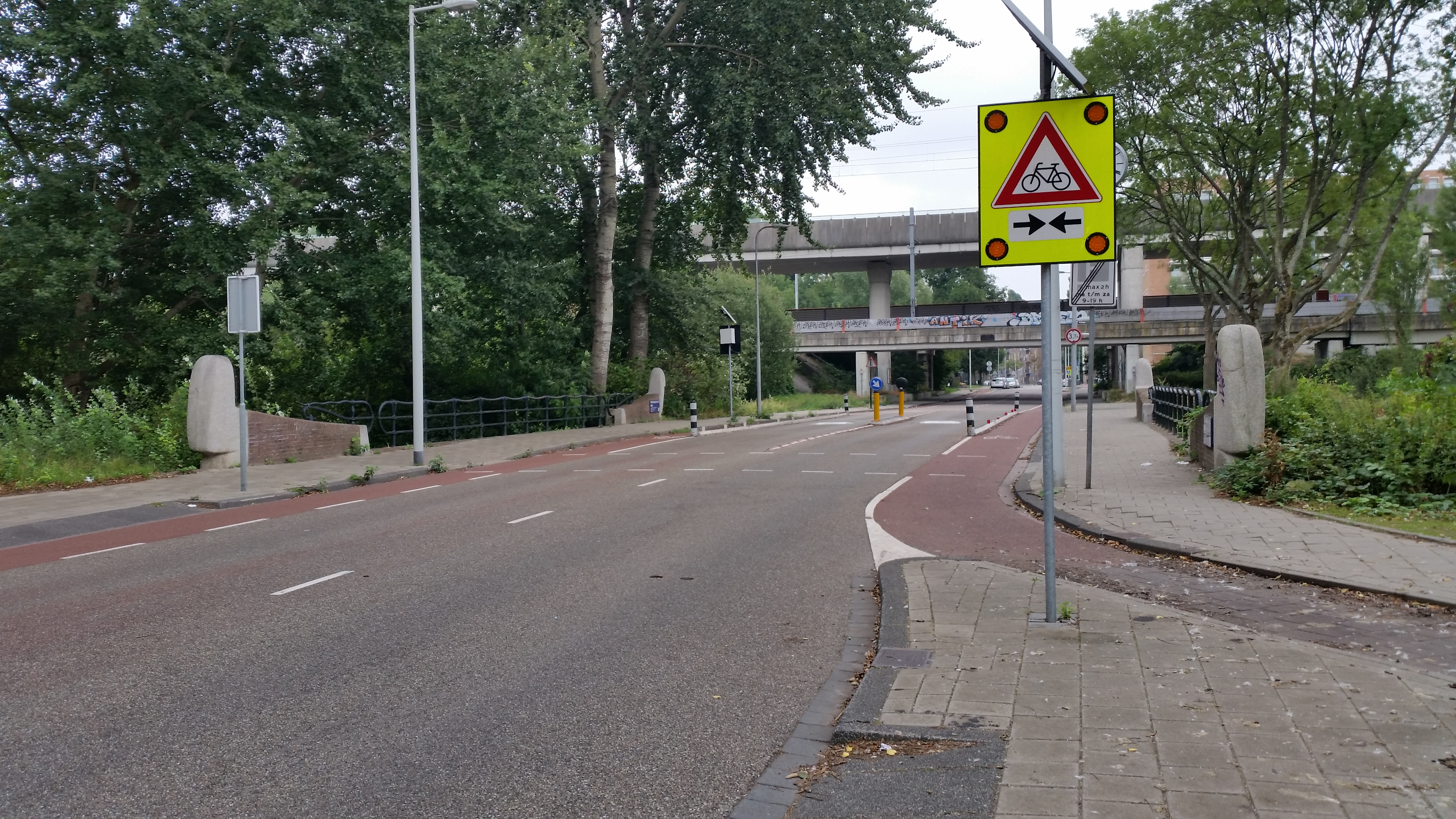 Overzichtsfoto van Brug 600, Frieda Belinfantebrug